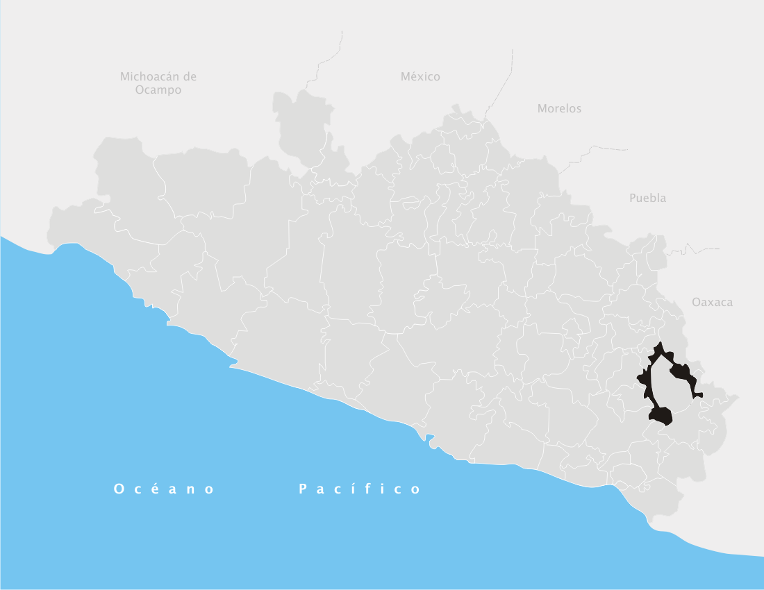 Metlatónoc en el estado de Guerrero (México)